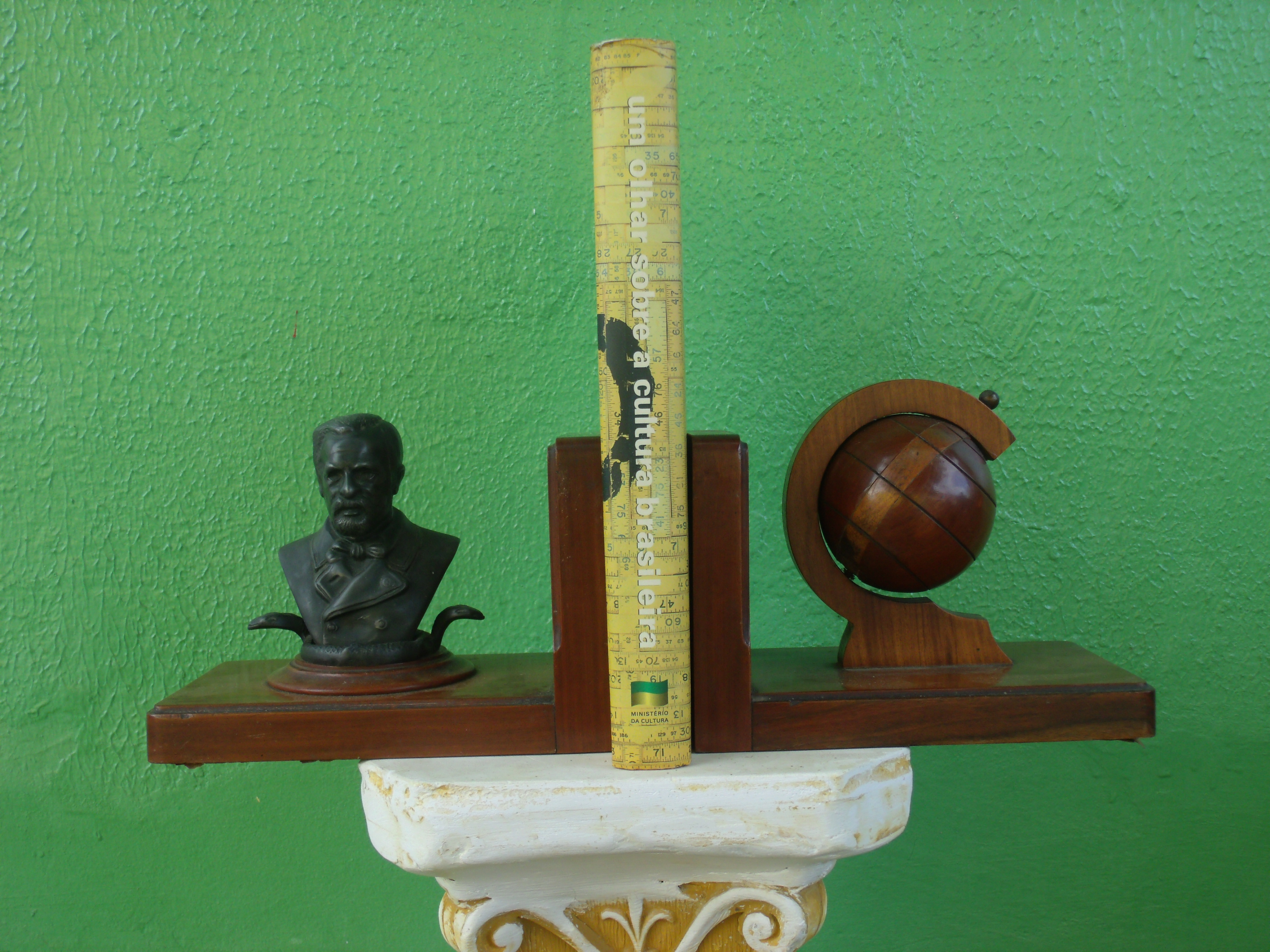 Livroː Um olhar sobre a cultura brasileira, editado em 1998, Ministério da Cultura, organizado por Francisco Weffort e Márcio Souza.